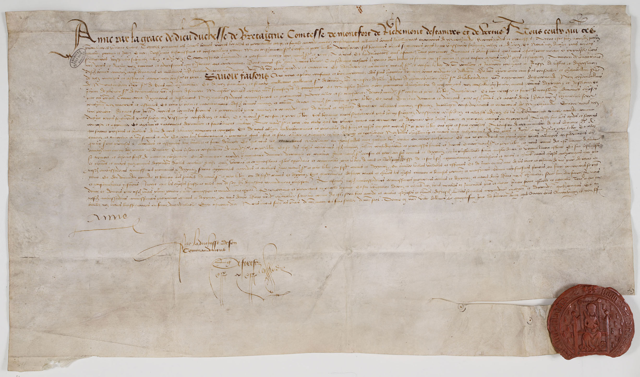 Procuration donnée par Anne de Bretagne à son chancelier Philippe de Montauban pour conclure un traité d'alliance avec le roi d'Angleterre, signée à Rennes le 15 février 1490 et scellée de cire rouge sur queue de parchemin.